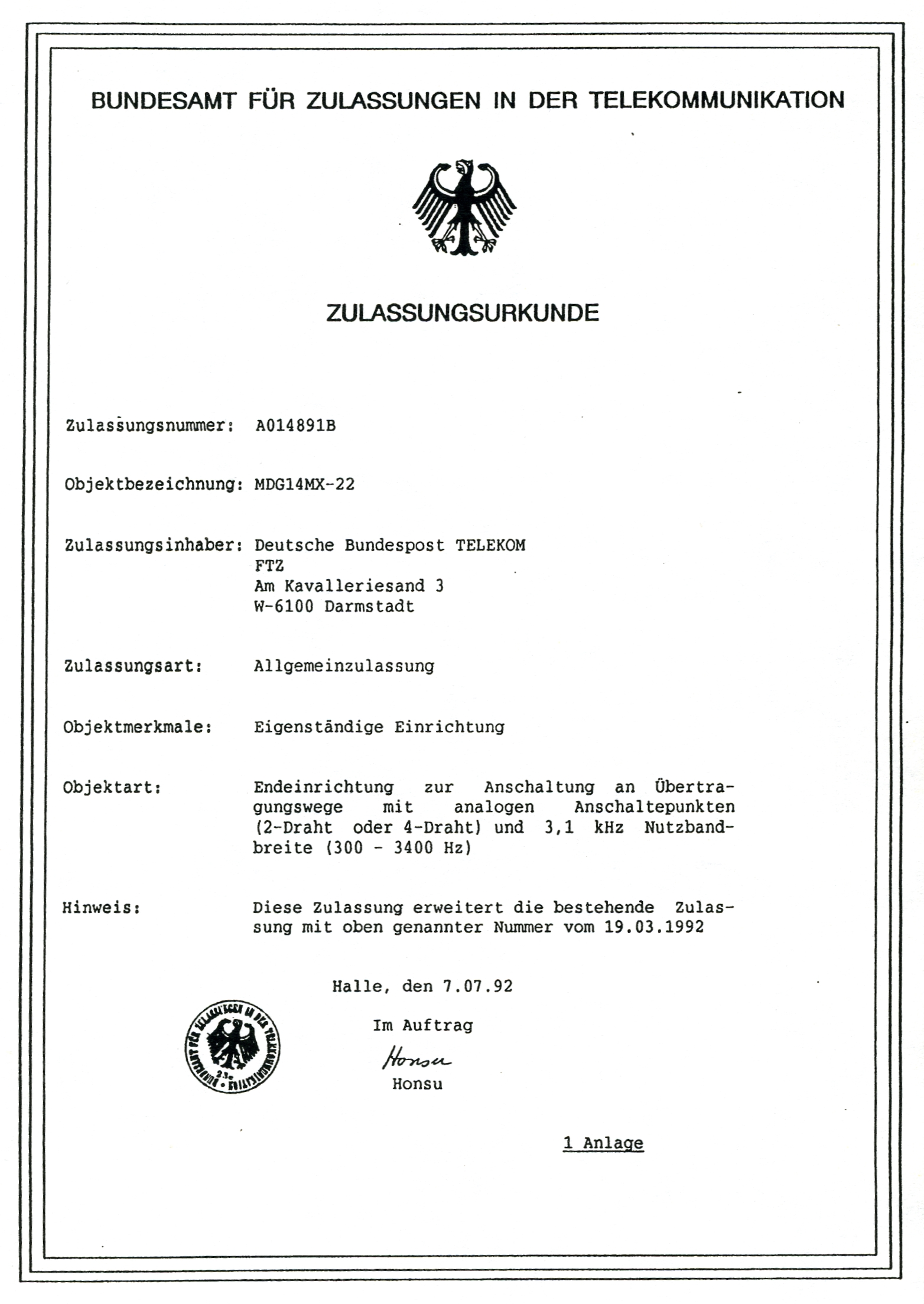 Zulassungsurkunde für ein analoges Modem: Erweiterungszulassung durch das Bundesamt für Zulassungen in der Telekommunikation